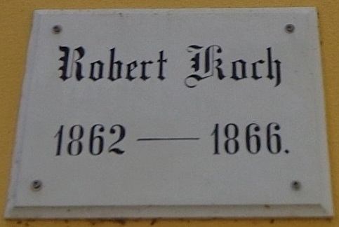 Göttinger Gedenktafel für Robert Koch, Bakteriologe und Nobelpreisträger (Goetheallee 4)